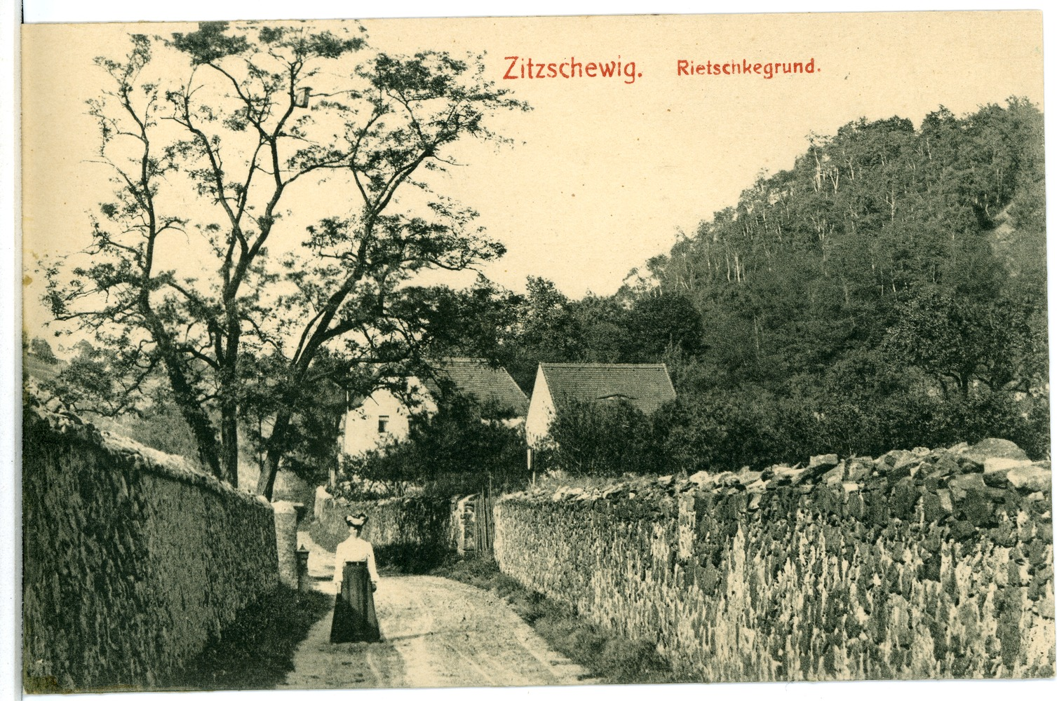 Zitzschewig; Rietschkegrund This postcard is from publisher Brück & Sohn in Meißen ( postcard has a unique number 02348 and is available in a higher resolution at the publisher. This images was uploaded in a cooperation project between Wikipedians and the publisher.